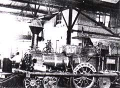 Locomotora del Ferrocarril La Habana - Cuba (1837), primera línea ferrea de Hispanoamérica y de España.